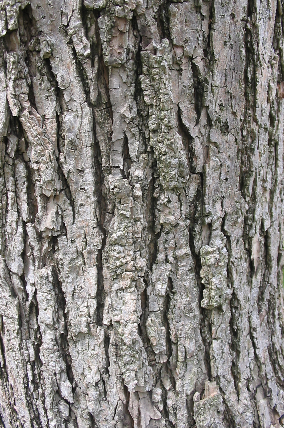 Fotografía de Pablo Alberto Salguero Quiles de la textura del tronco de Catalpa speciosa de las Bignoniaceae, procede de Estados Unidos. En Español se le denomina Catalpa. La fotografía está realizada en el Real Jardín Botánico de Madrid. España. El 4 de Abril de 2007.